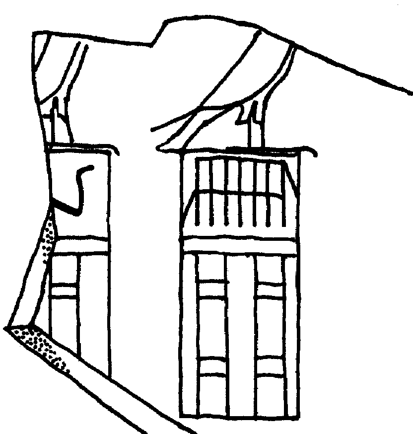 Schieferfragment K-5089 mit den Horusname der KÖnige Djer und Wadji (1. Dynastie)